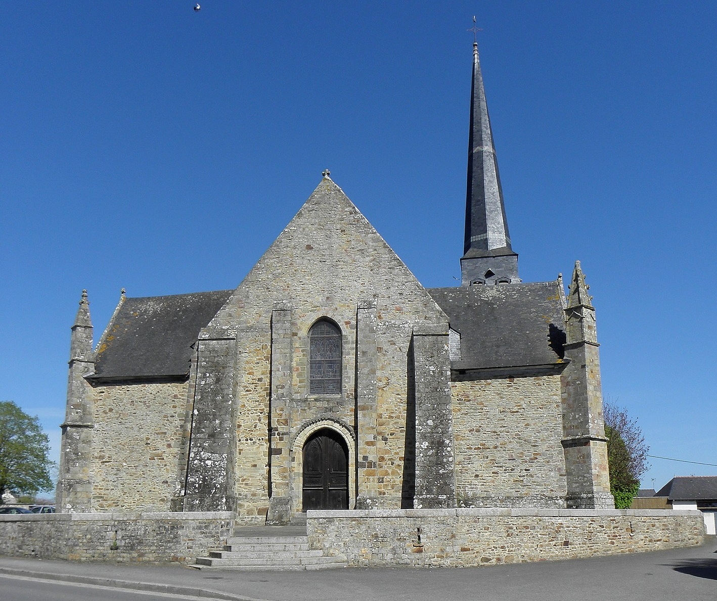 Façade ouest de l'église Saint-Crépin et Saint-Crépinien de Rannée (35).